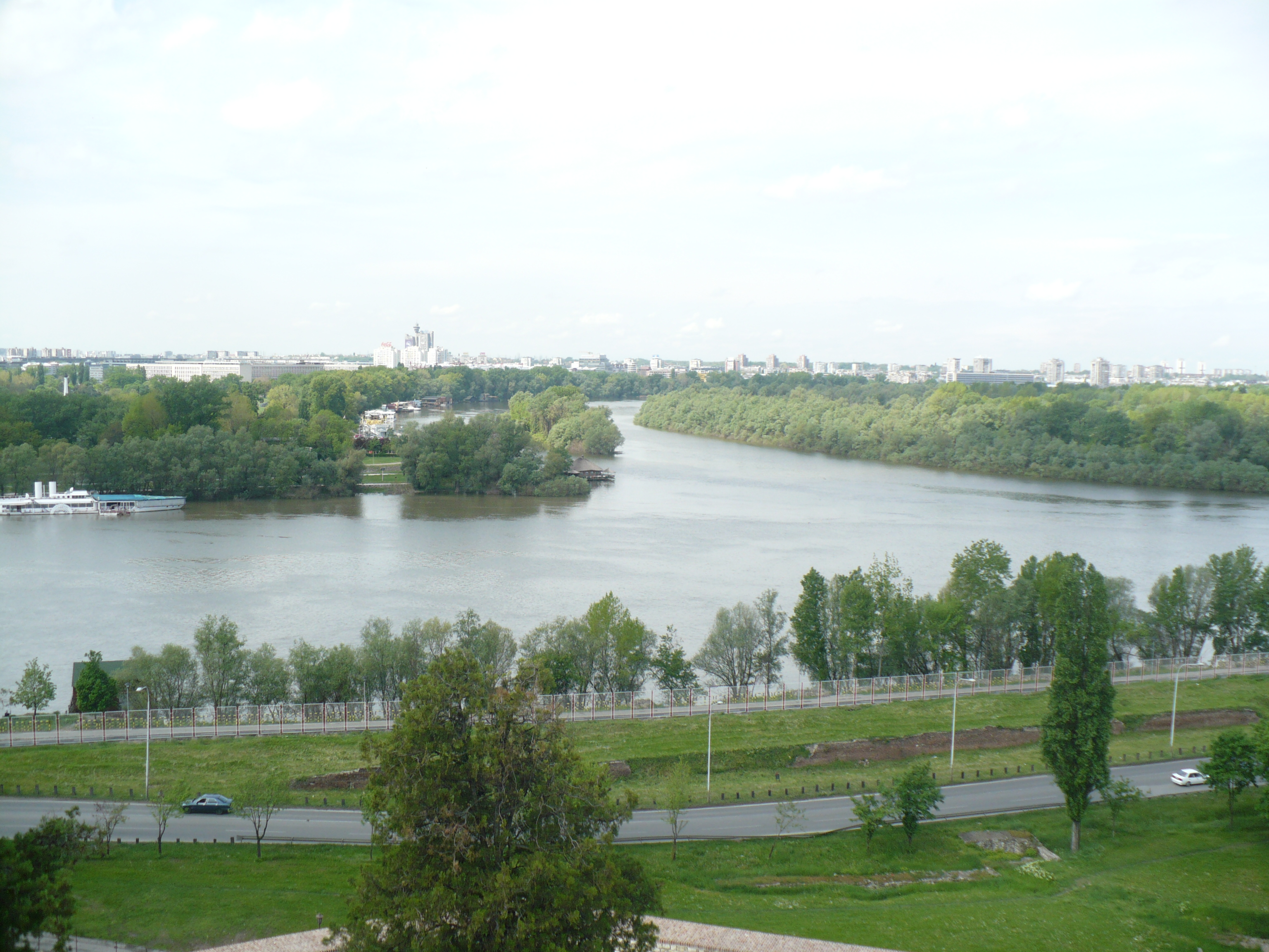 Belgrad Kalesi'nden görüntüler